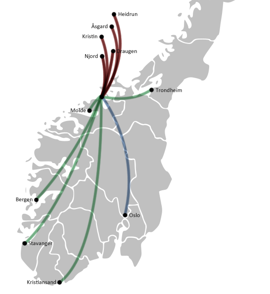 Rutekart, Kristiansund lufthavn, innenriks